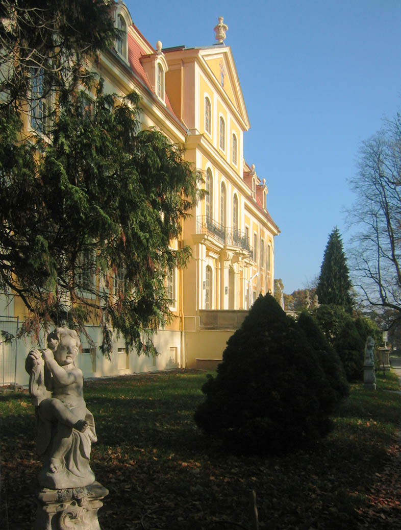 Rammenau, Germany: Barockschloss Rammenau